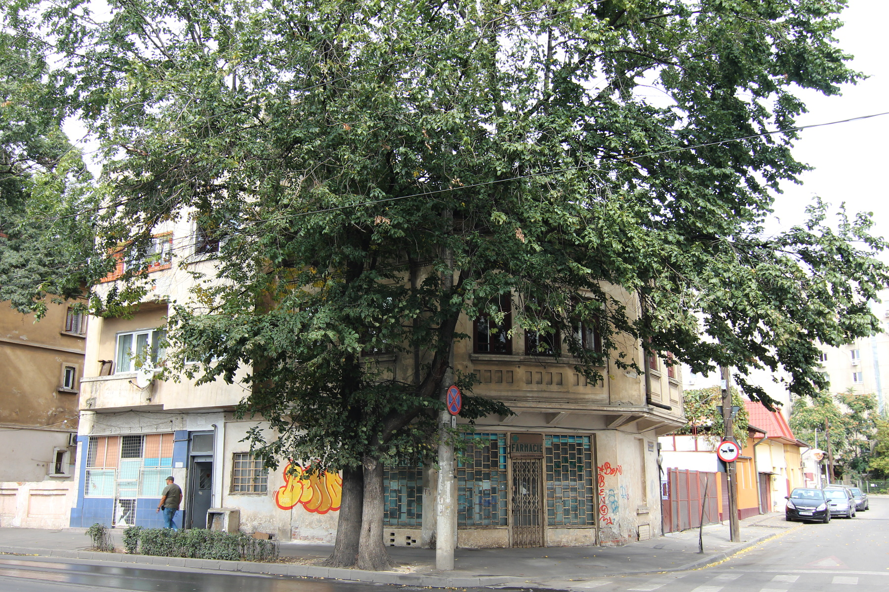 Farmacie pe Dudești